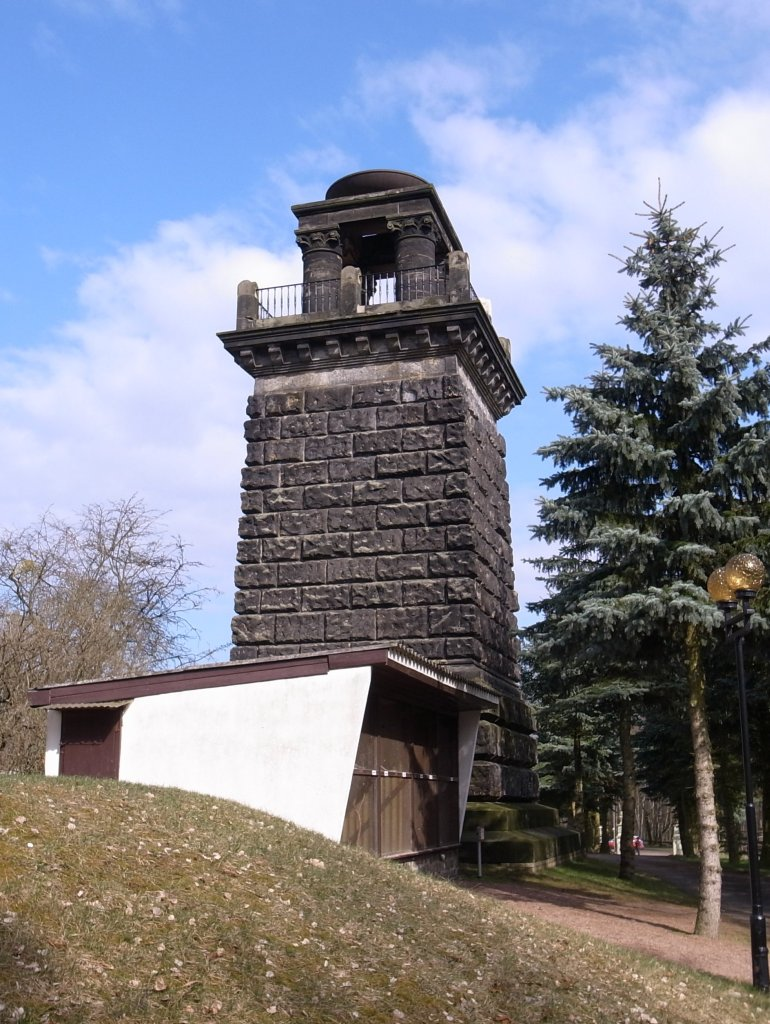 Coswig (Anhalt), Bismarckturm